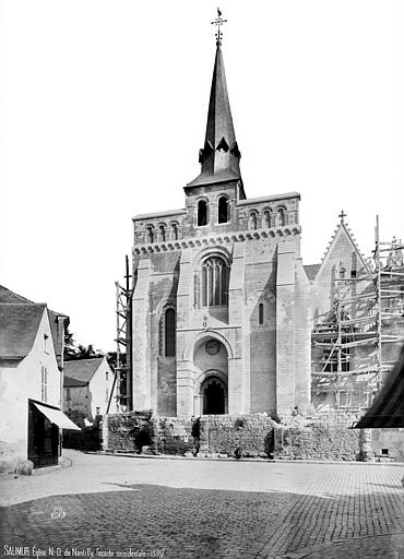 Côté ouest.